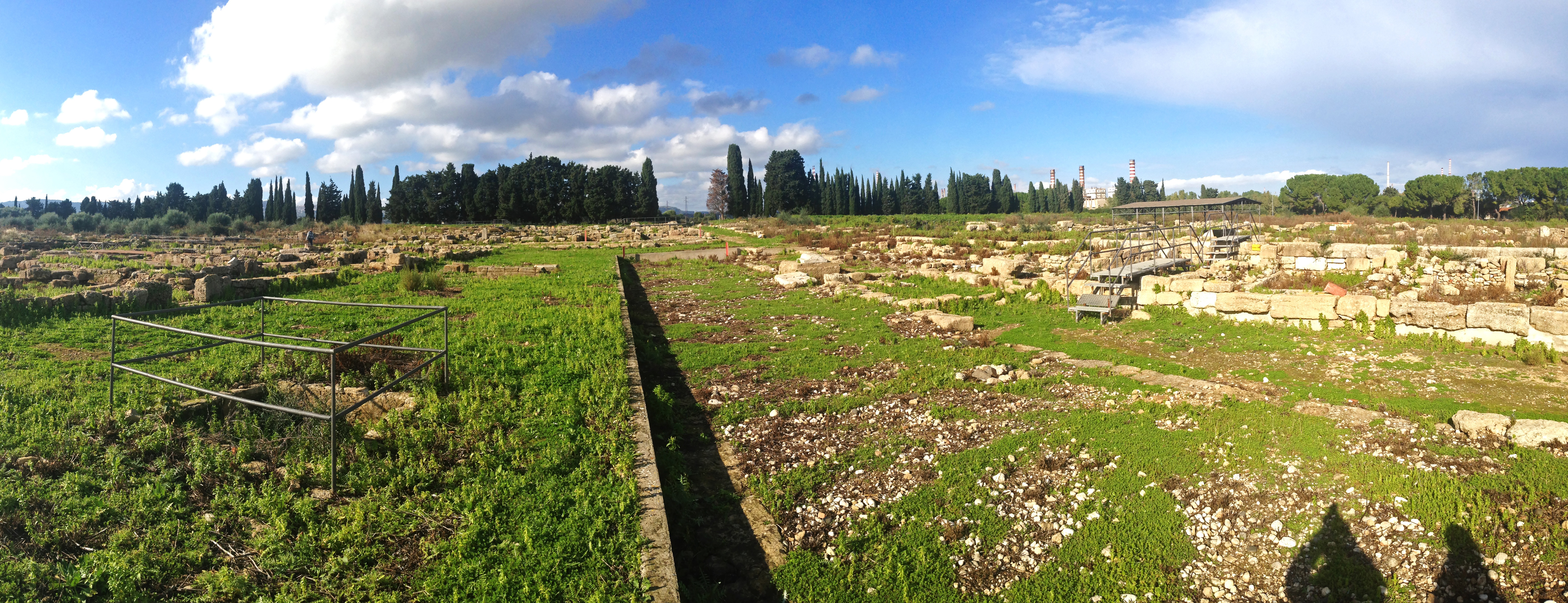 Agora Megara Hyblaea